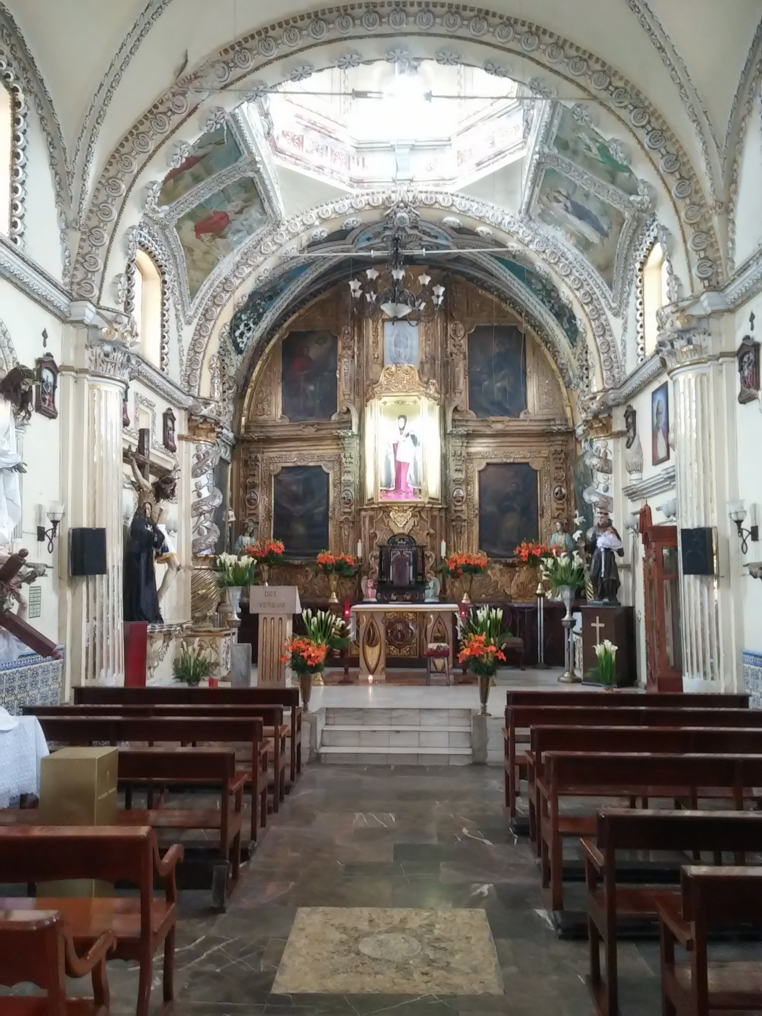 Interior de la parroquia de Santa Anita en Iztacalco